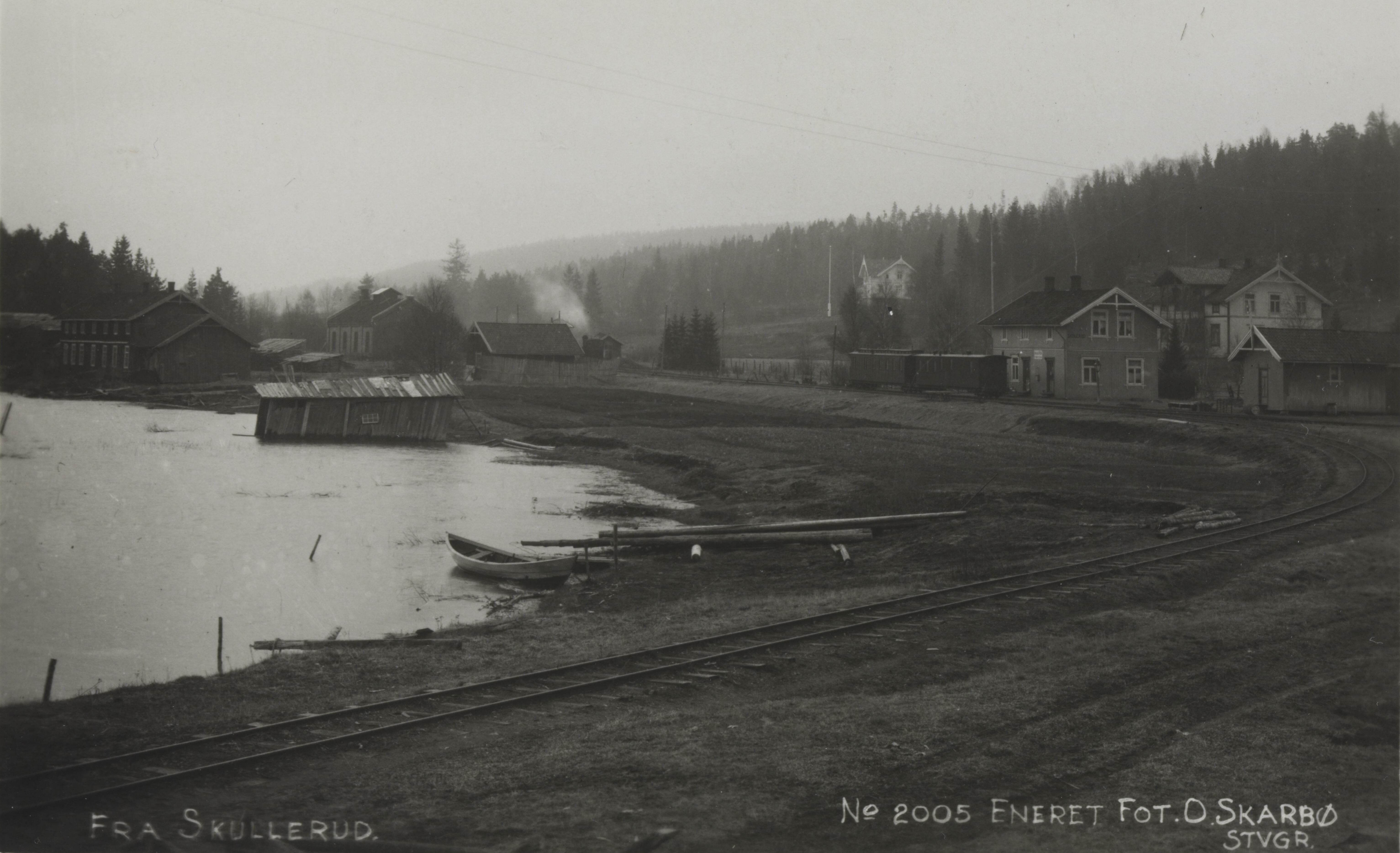 Bildet er hentet fra Nasjonalbibliotekets bildesamling Skullerud, Aurskog-Høland, Akershus